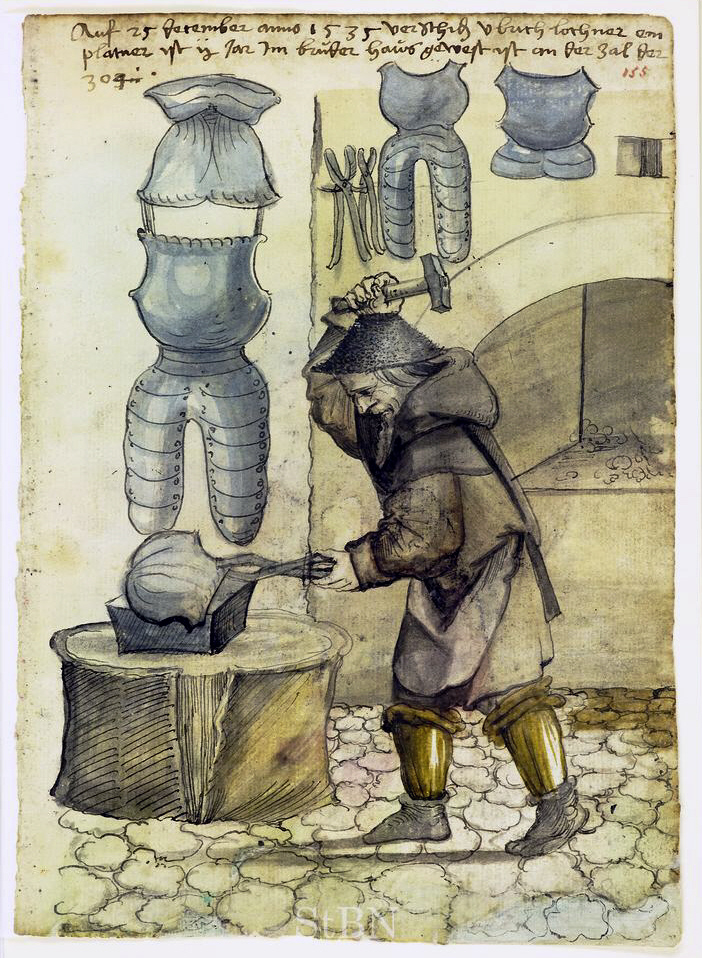 vlrich (Ulrich) lochner (Lochner) , platner (Plattner; Harnischmacher) Transkription und weitere Informationen